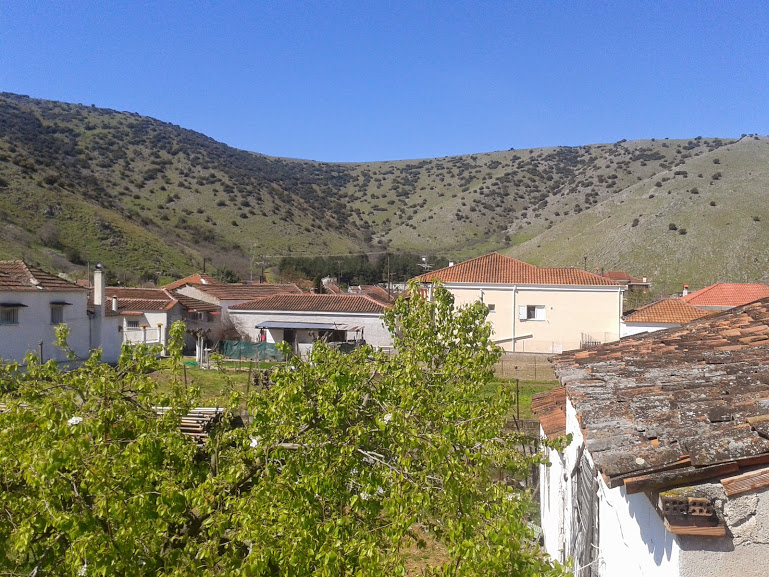 Πετρωτό Τρικάλων